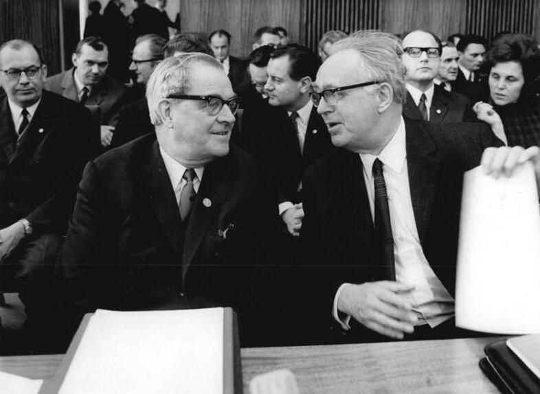 Zentralbild Junge 12.3.1970 Berlin: 22. Sitzung des Staatsrates. Unter Leitung seines Vorsitzenden Walter Ulbricht trat am 12. März 1970 der Staatsrat der DDR zu seiner 22. Sitzung zusammen. Als Gäste nahmen hervorragende Persönlichkeiten auf dem Gebiet der Wissenschaften teil. Prof. Dr. Hermann Klare (vorne l.), Präsident der Deutschen Akademie der Wissenschaften, hier vor Beginn der Sitzung im Gespräch mit dem Vorsitzenden des Forschungsrates der DDR, Prof. Dr. Dr. Max Steenbeck, erläuterte den Bericht über die Durchführung der Akademiereform unter besonderer Berücksichtigung der Wissenschaftsorganisation.